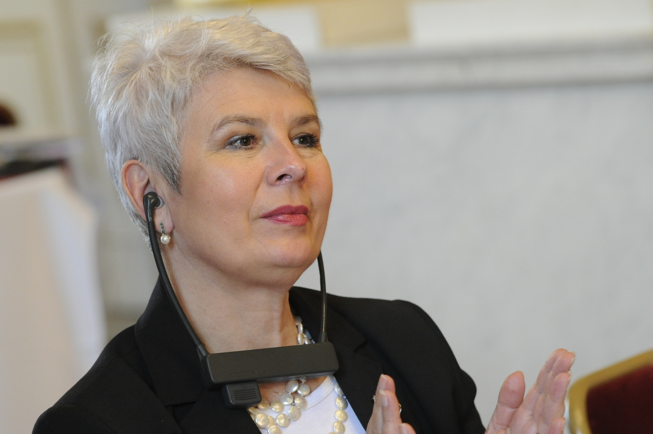 EPP Summit March 2010